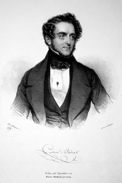 Cesare Badiali (ca. 1810-1865), italienischer Opernsänger (Bassbariton)